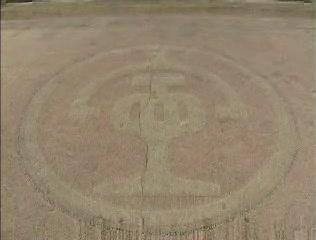 新寧鐵路标志